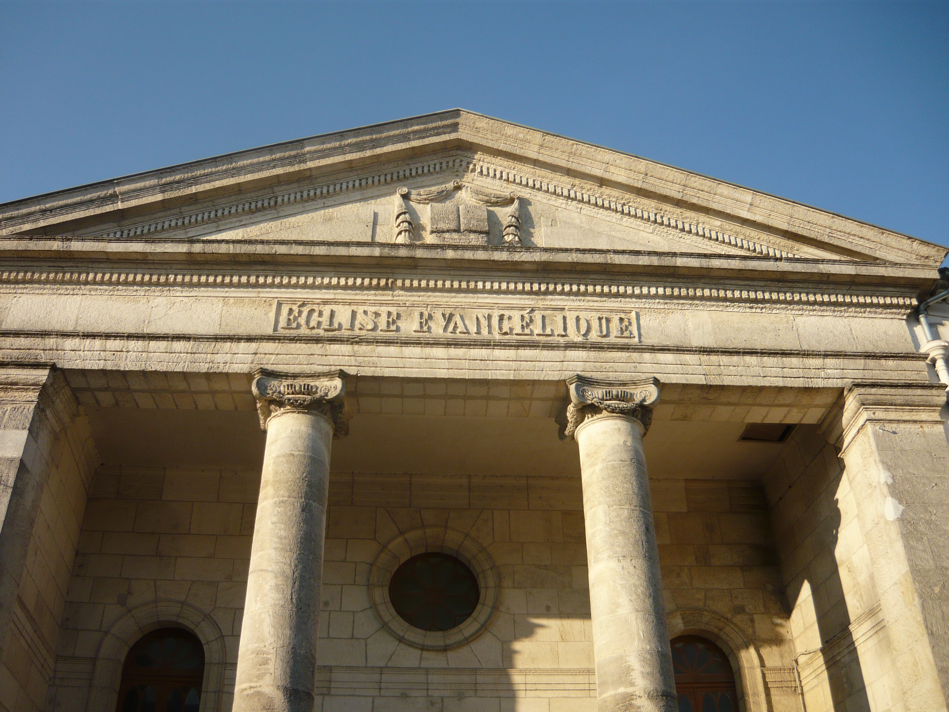 Façade du Temple de Marennes (17).